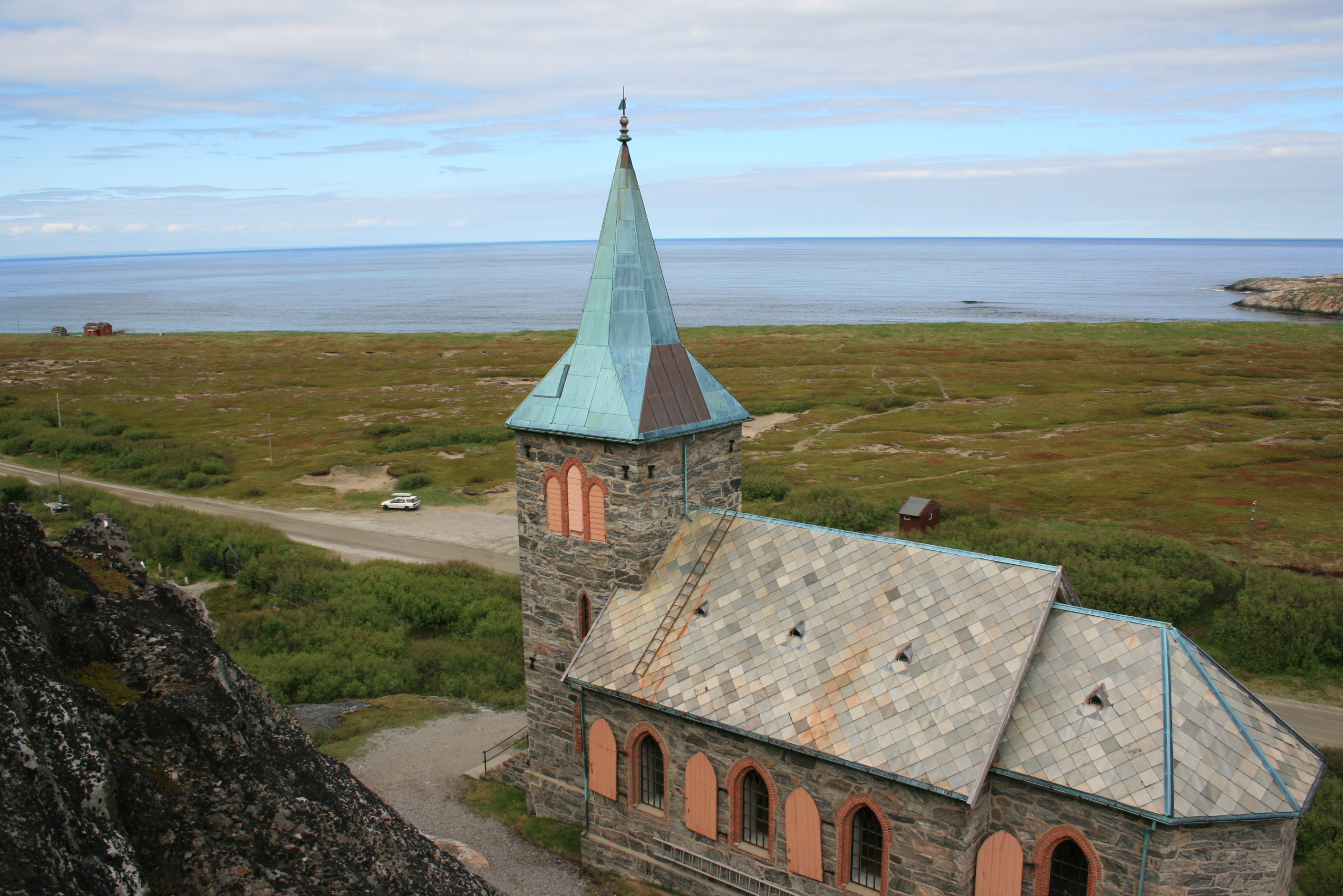 King Oscar II Chapel, Grense Jakobselv, Norway